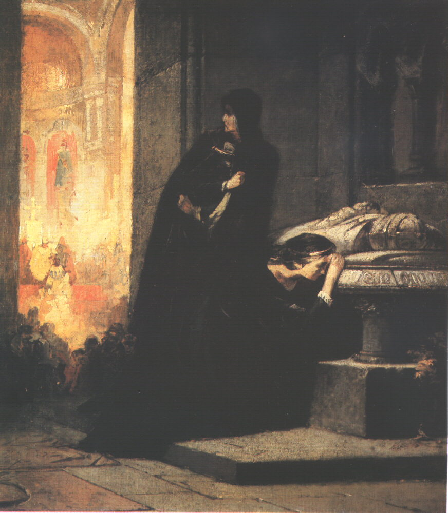 La reine Elisabeth de Bosnie et sa fille Marie de Hongrie se recueillent sur la tombe de leur mari et père Louis Ier de Hongrie, alors que son successeur Charles III de Naples est couronné.